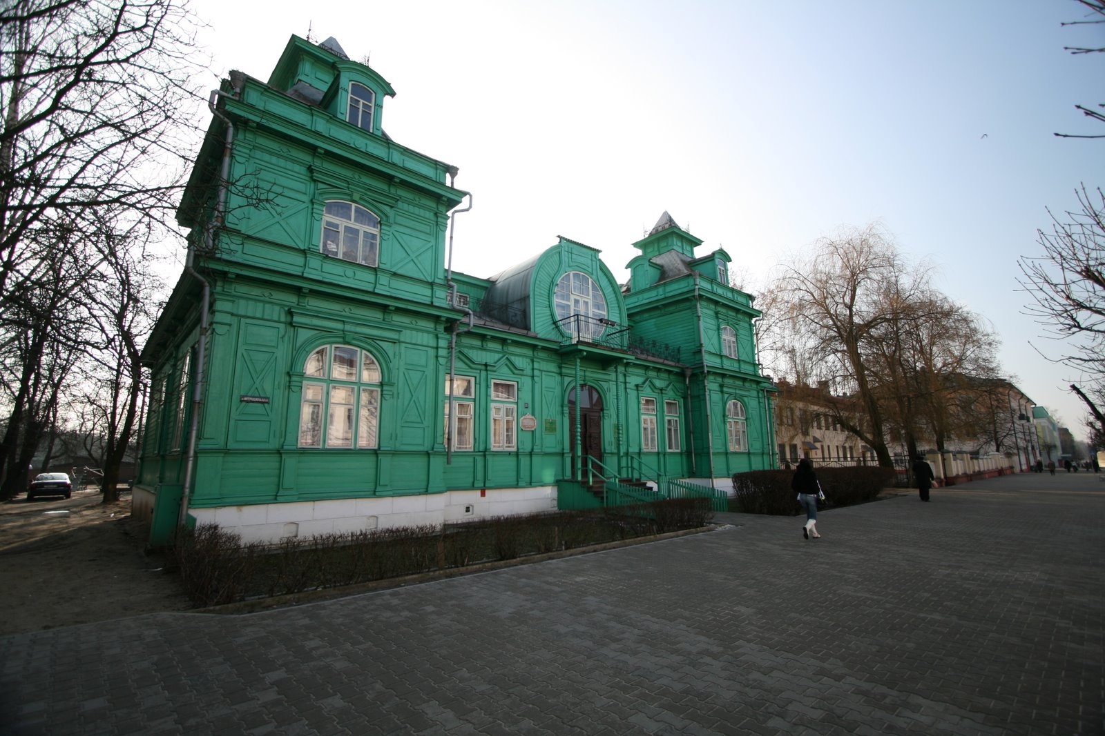 Babruysk